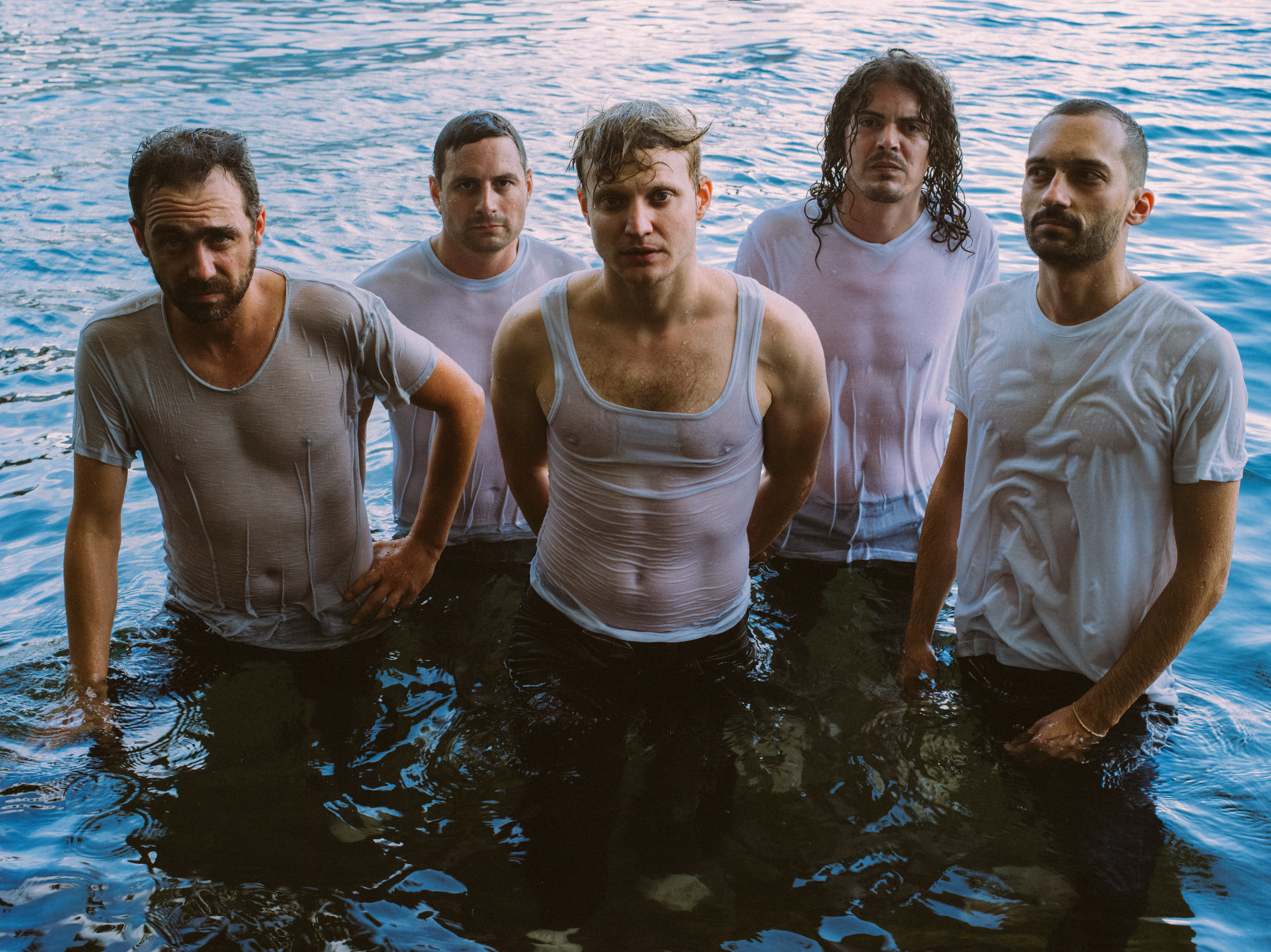 Tim Freitag (Band)